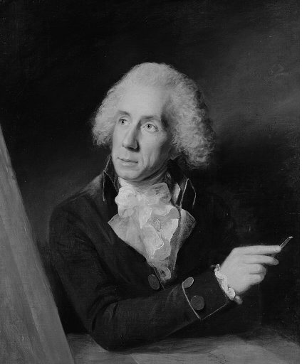 Francesco Bartolozzi (1725-1815)